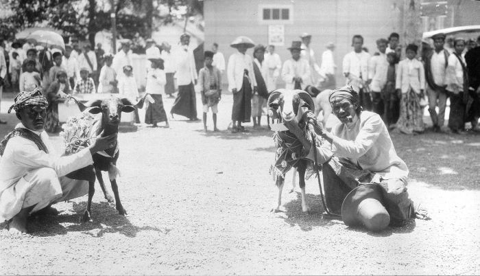 Foto. Dua ekor domba jantan dihias dan ditampilkan untuk menghormati kunjungan Gubernur Jenderal Hindia Belanda Mr. Dirk Fock ke Garut, Jawa Barat.